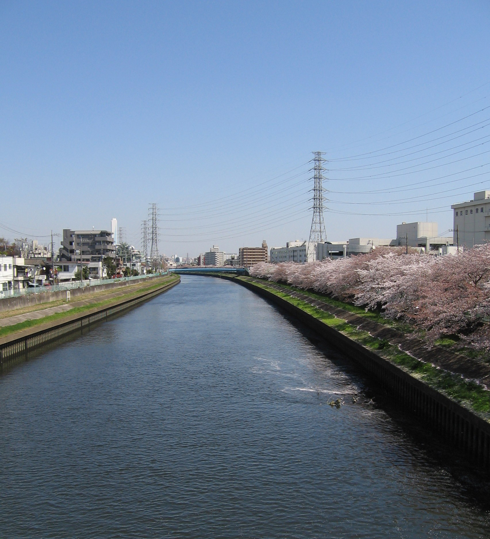 新河岸川。板橋区高島平6丁目の早瀬人道橋より下流（東南東）の方向を見る。左岸は同区新河岸3丁目。